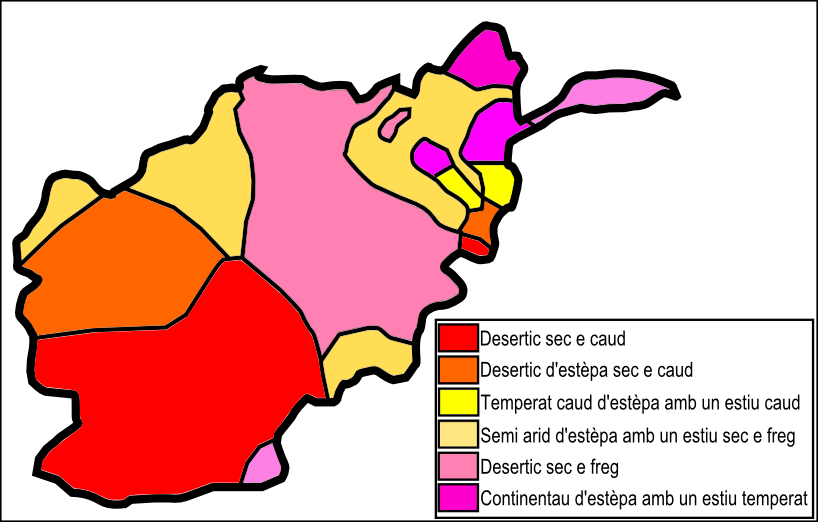 Clima d'Afganistan.